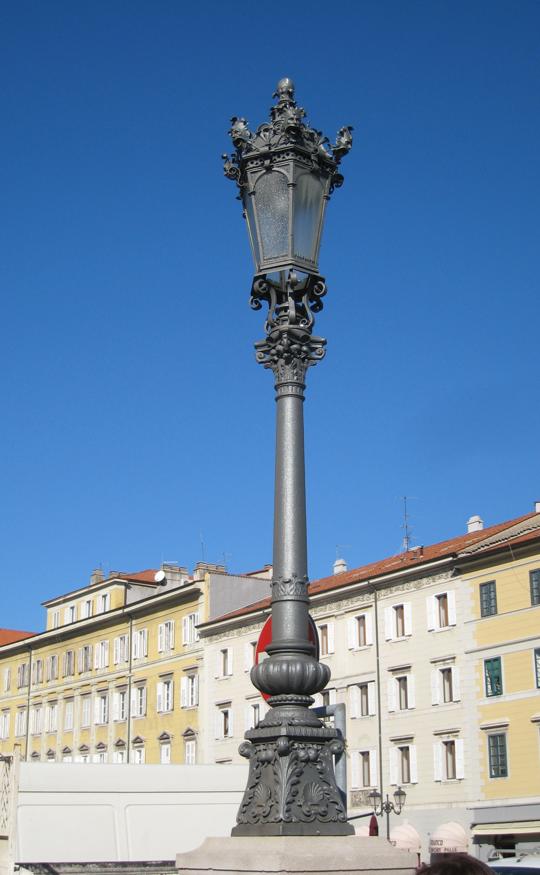 Lamp in Ponte Rosso (Trieste)